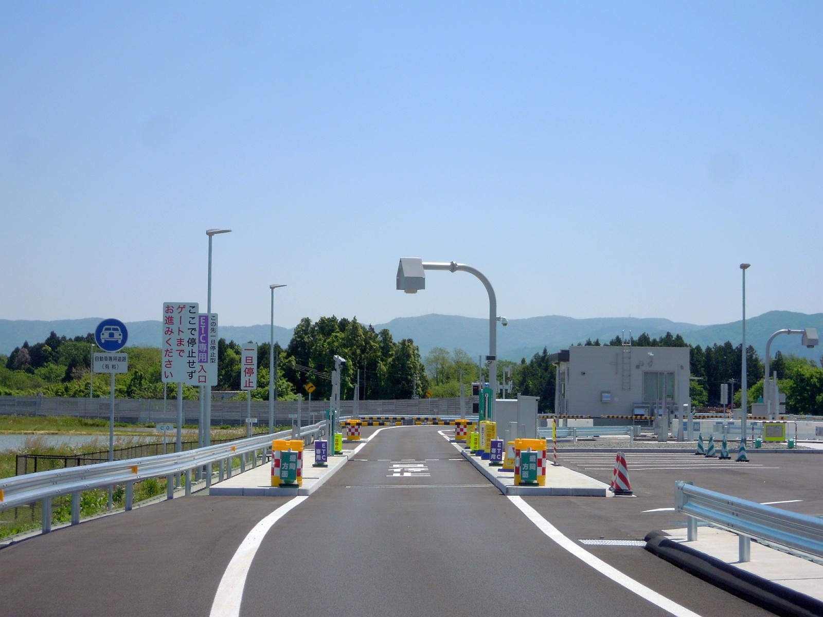 岩手県奥州市にある東北自動車道奥州スマートインターチェンジ（下り線側）入口料金所を一般道側から。